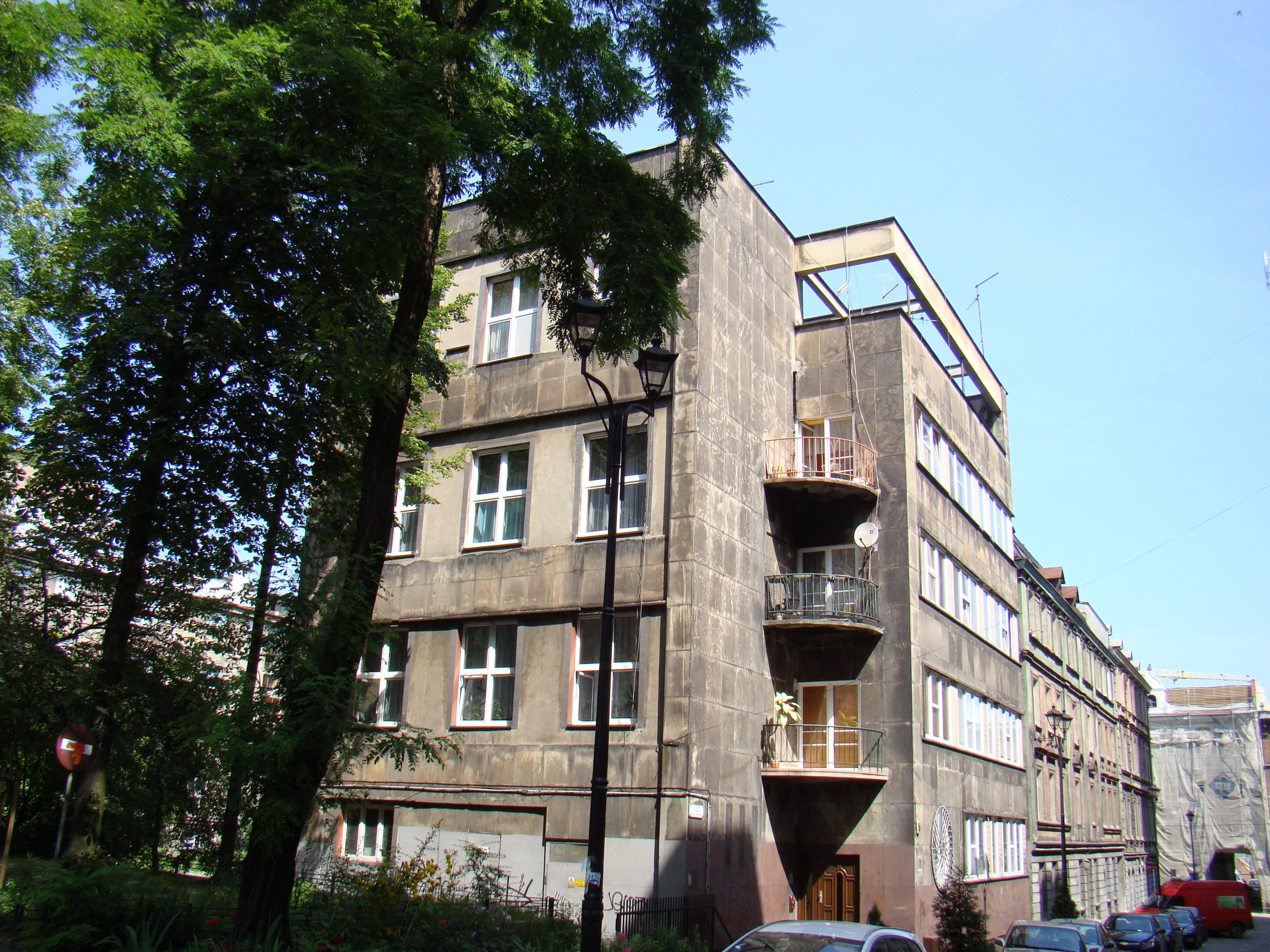 Katowice, Budynek będący pozostałością skrzydła mieszkalnego Muzeum Śląskiego, 1935